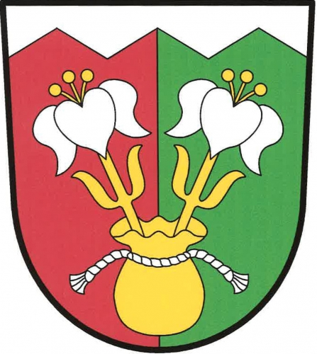 Luka (CL), znak. V červeno-zeleně polceném štítě pod stříbrnou zvýšenou pilovitou hlavou vyrůstají ze zlatého váčku, převázaného stříbrnou šňůrou, dvě odkloněné stříbrné přirozené lilie se zlatými tyčinkami na zlatých stoncích.